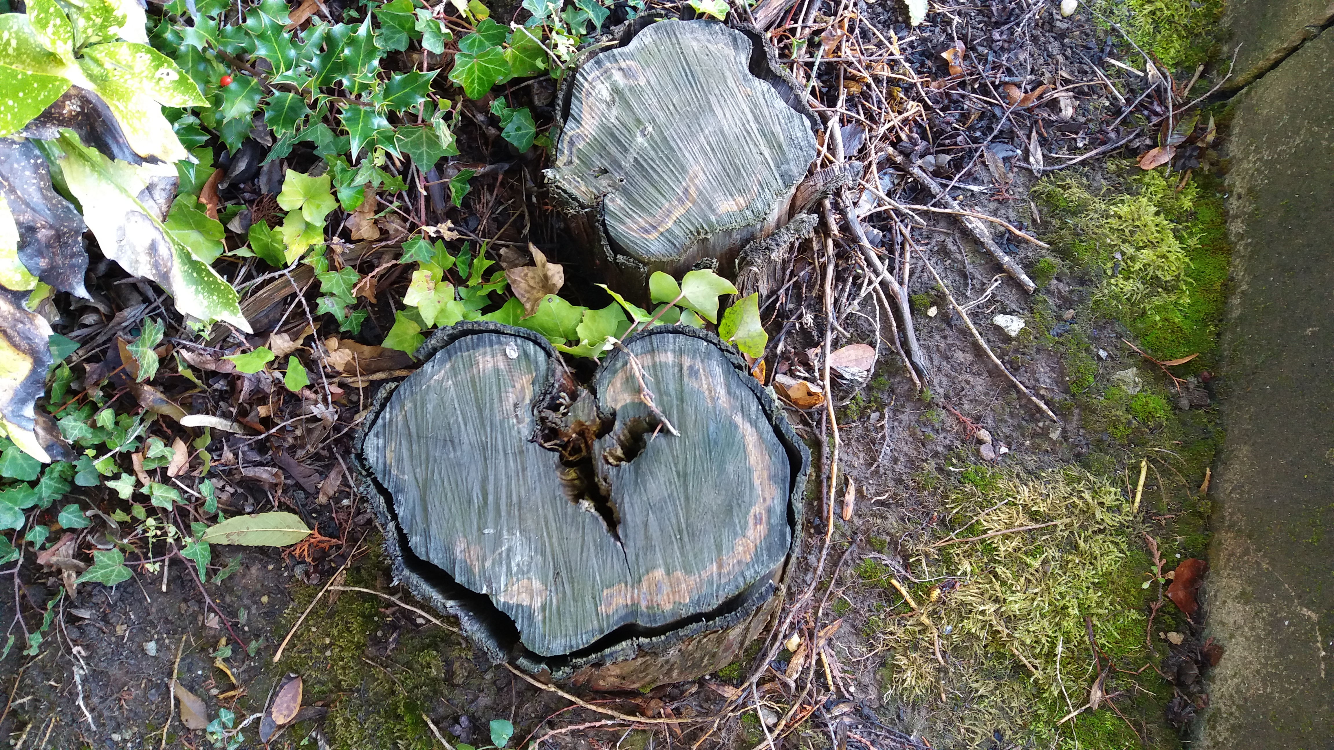 Souche d'arbre en forme de cœur, à l'entrée du Cimetière Badin à Givors, France (15 oct 2016).